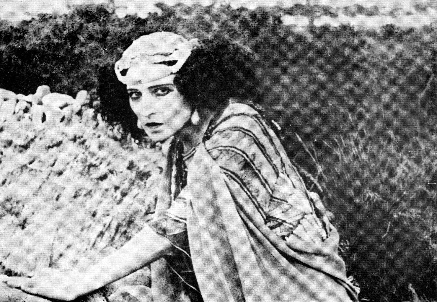 Ida Rubinstein interprete de La nave (G. D'Annunzio, 1921)